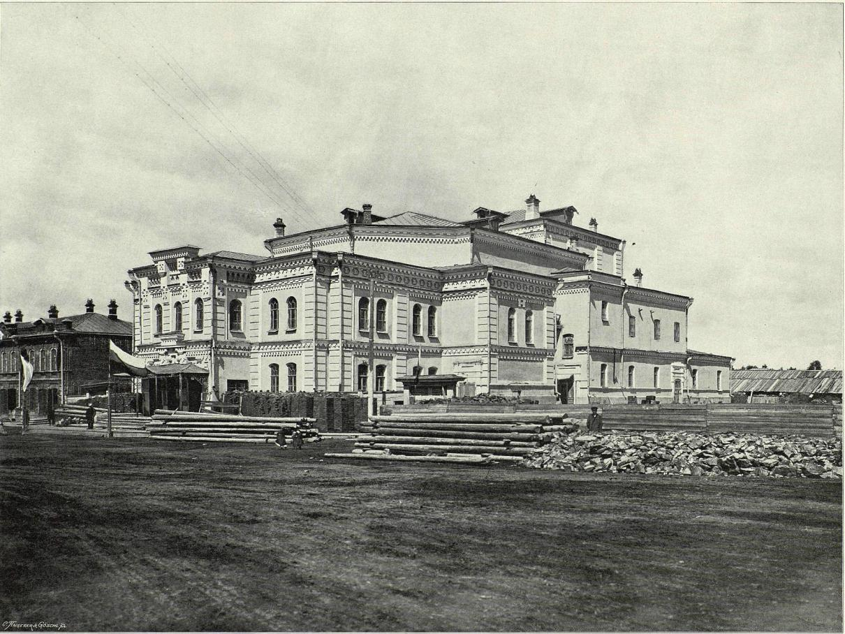 Томск. Театр Е. И. Королёва